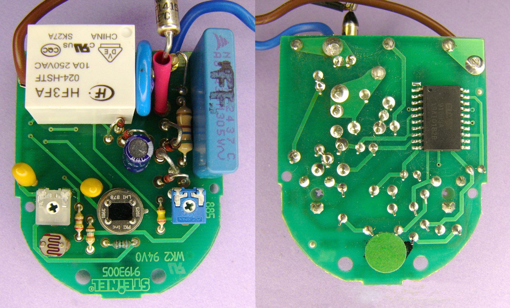 Leiterplatte eines PIR-Bewegungsmoduls für eine Lampen- bzw. Verbrauchersteuerung im 220-Volt-Netz. Unterhalb des Potentiometers für die Vorgabe der Einschaltdauer befindet sich ein Fotowiderstand (LDR), welcher die Umgebungshelligkeit für die ebenfalls einstellbare Einschaltschwelle erfasst.